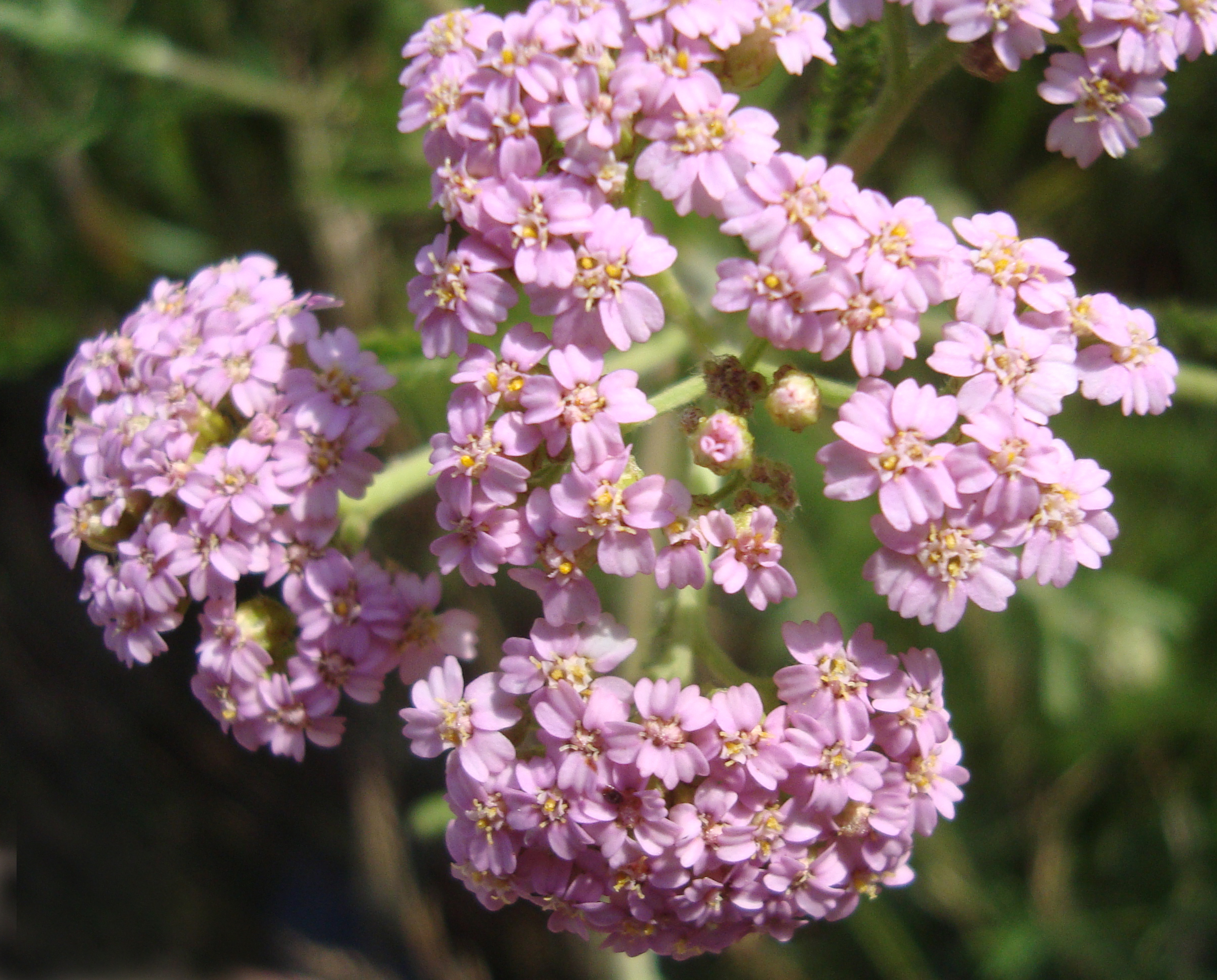 Přírodní park Střední Pojihlaví, Česká republika, jižní Morava